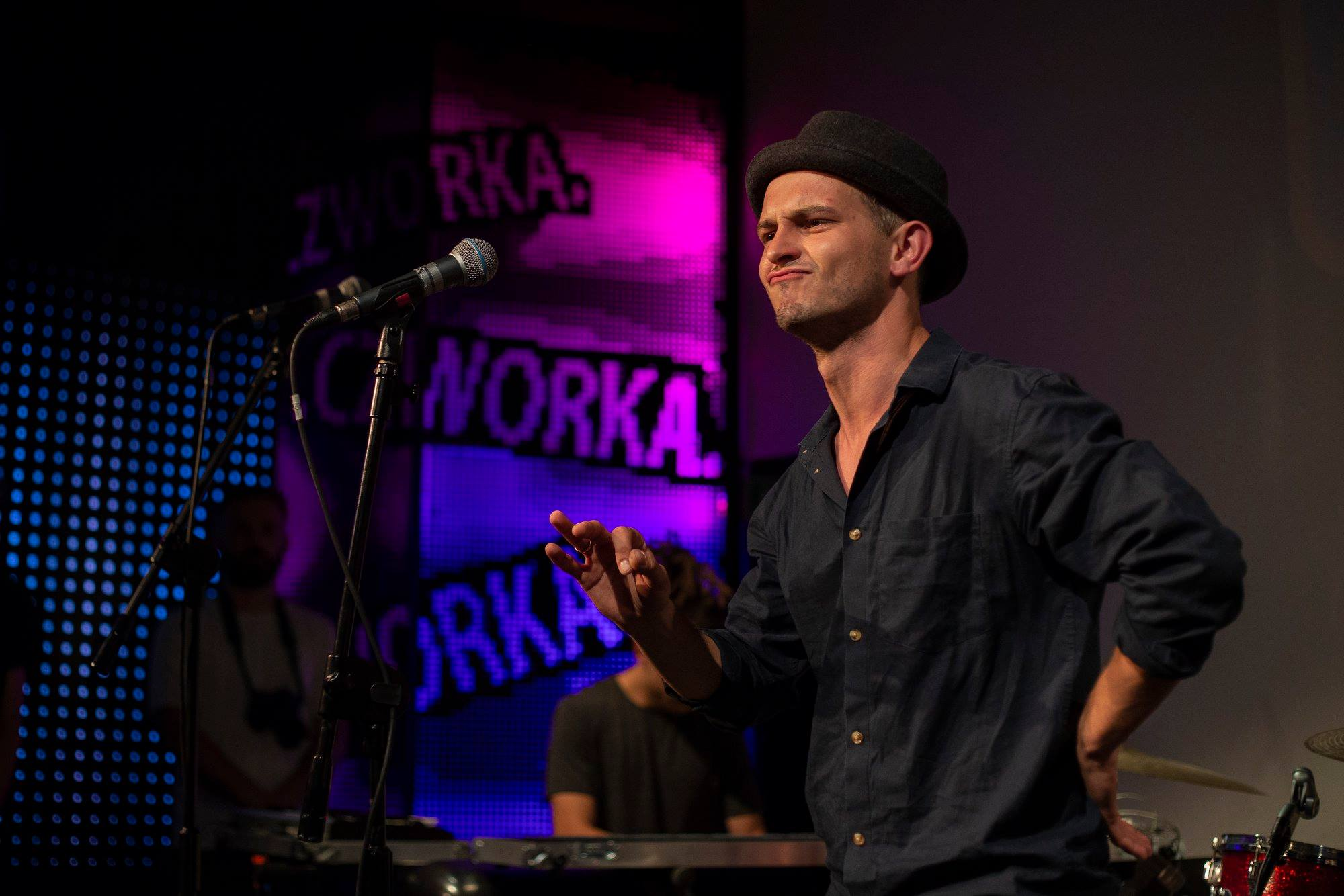 Bitamina podczas koncertu w studiu Czwórki Polskiego Radia.